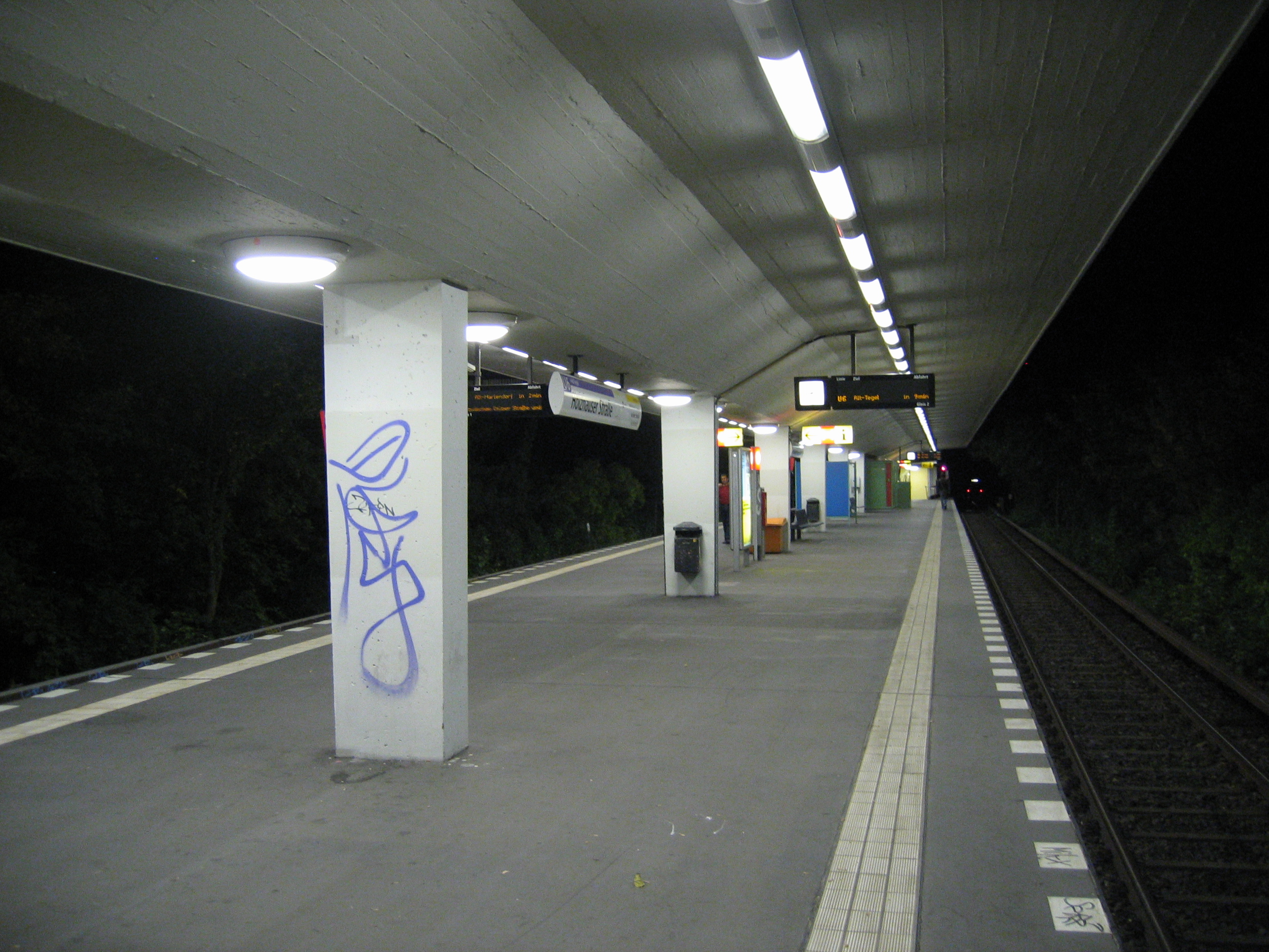 U-Bahnhof Holzhauser Straße, Berlin